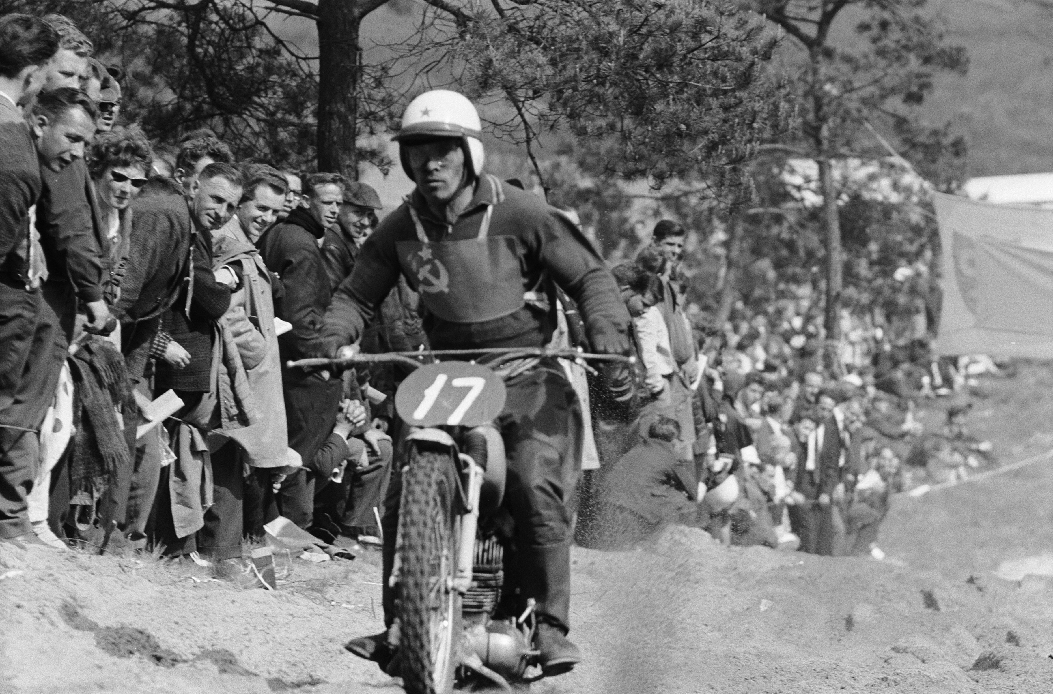 Collectie / Archief : Fotocollectie Anefo Reportage / Serie : [ onbekend ] Beschrijving : Motorcross 1962 De Zandberg te Bergharen Annotatie : [een Russische deelnemer] Datum : 3 juni 1962 Locatie : Bergharen Trefwoorden : MOTORCROSS Fotograaf : Pot, Harry / Anefo, [onbekend] Auteursrechthebbende : Nationaal Archief Materiaalsoort : Negatief (zwart/wit) Nummer archiefinventaris : bekijk toegang 2.24.01.05 Bestanddeelnummer : 913-9879